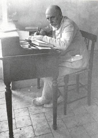 Luigi Pirandello a Monteluco nell'estate del 1924.